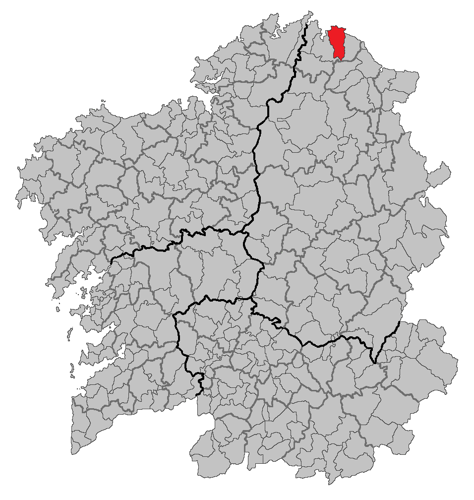 Mapa coa localización do concello de Xove.